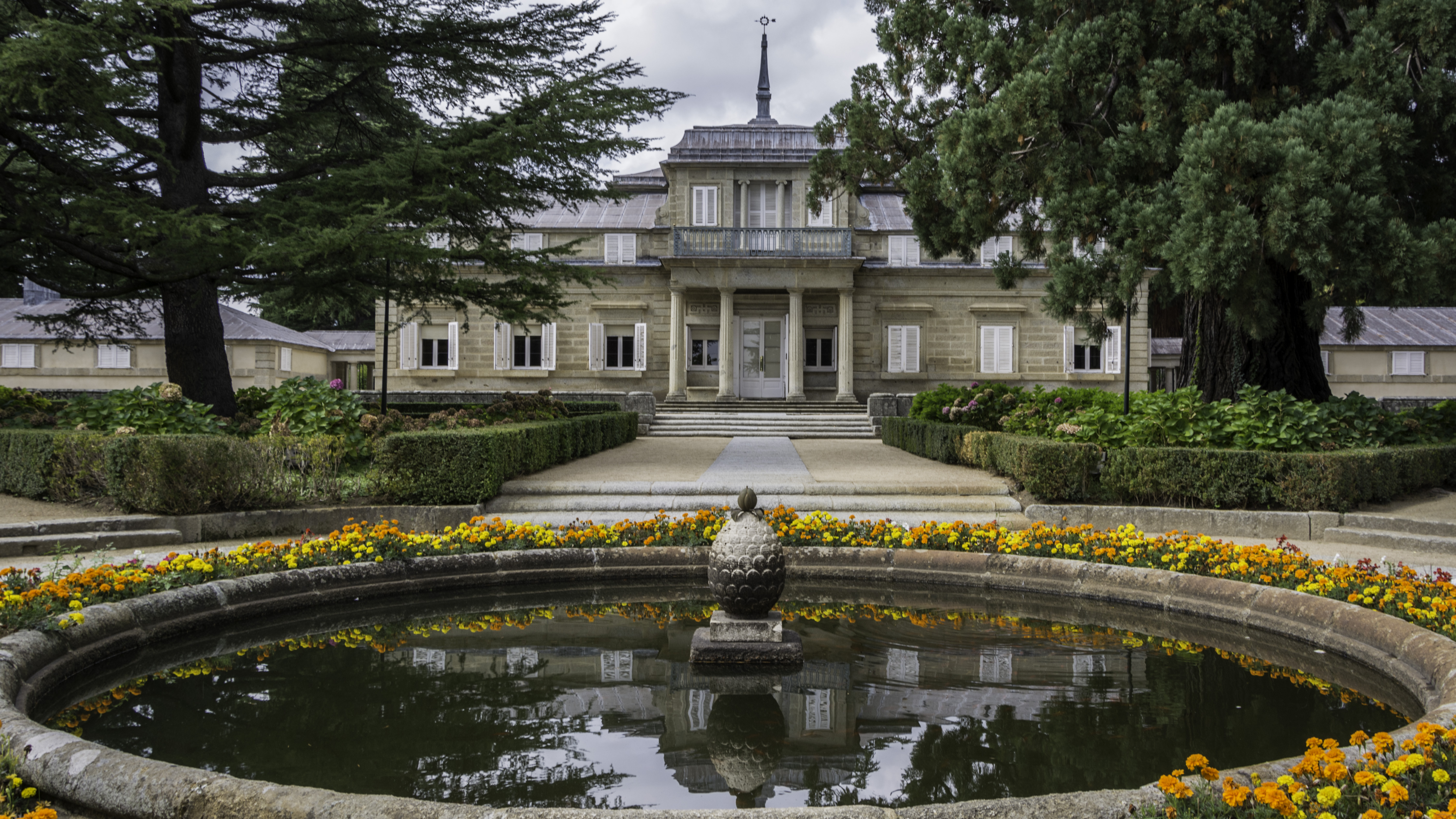 casita del infante de el escorial